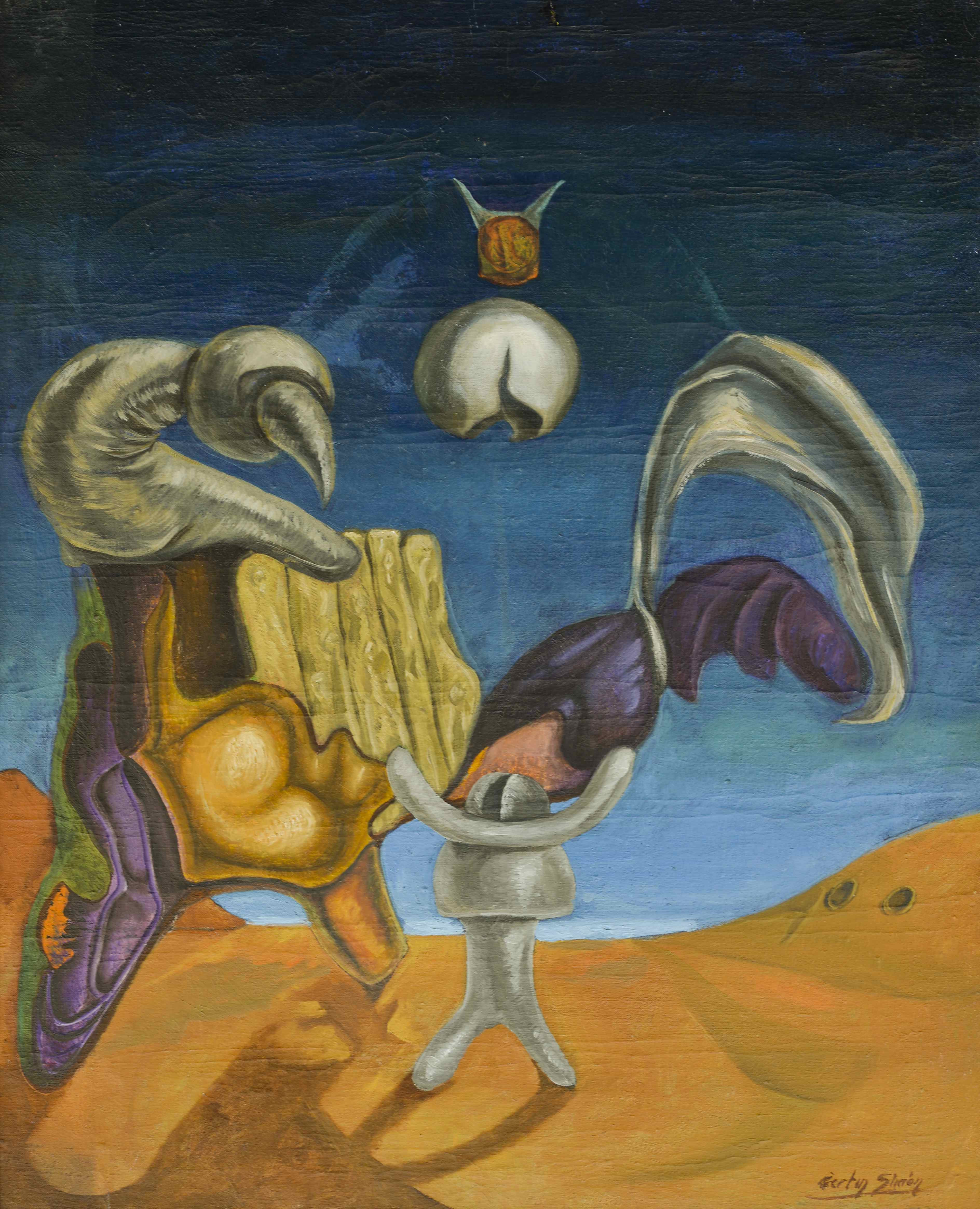 Urogallo